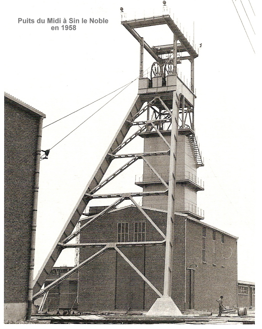 La Fosse Puits du Midi ou Notre Dame Sud du Groupe de Douai était un charbonnage constitué d'un seul puits situé à Sin-le-Noble, Nord, Nord-Pas-de-Calais, France.